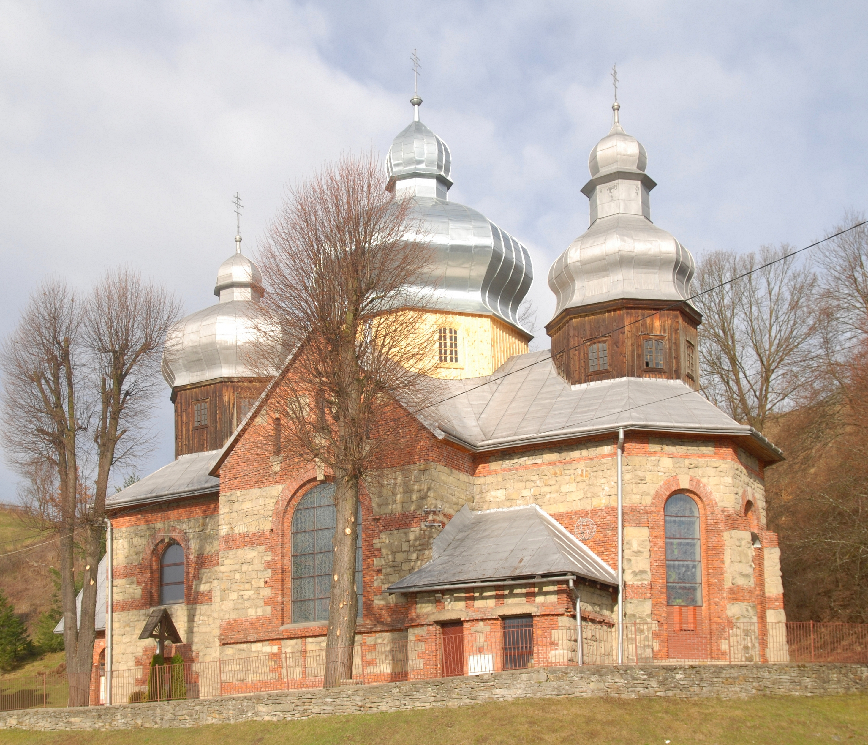 wieś Żegiestów